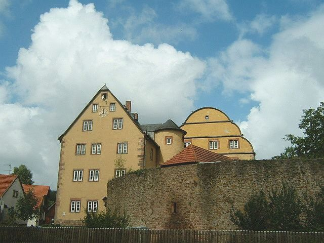 Wasserburg in Burgjoß (Spessart, Germany) von 1572. Der Ort ist Teilgemeinde von Jossgrund.